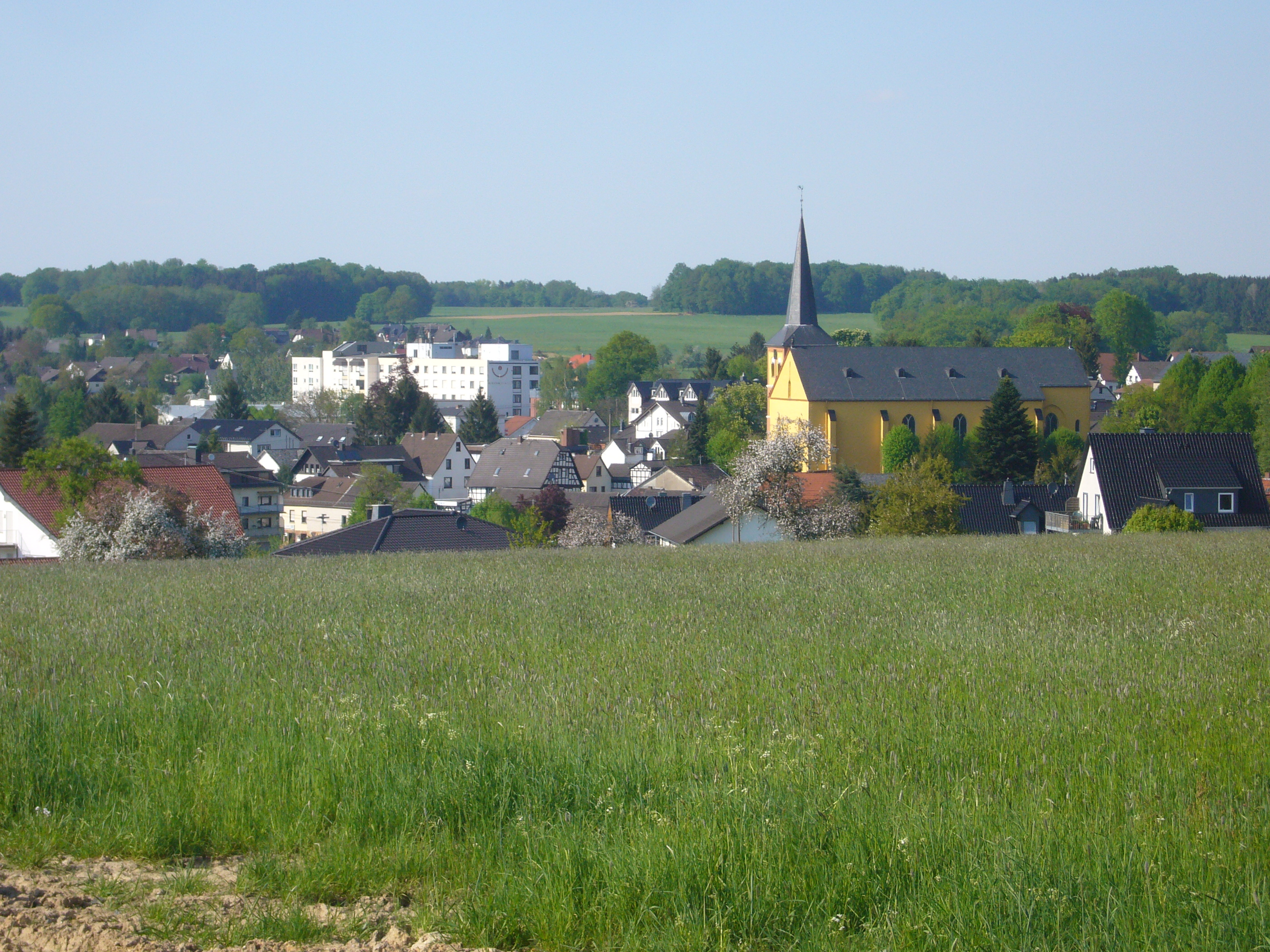 Kamillusklinik in Asbach